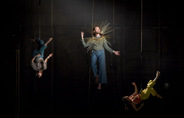 ALCIONE Tragédie lyrique en cinq actes. Livret d’Antoine Houdar de La Motte. Créée à l'Académie royale de musique en 1706. Production 2017 Opéra Comique photo: Vincent Pontet ( Direction musicale, Jordi Savall Mise en scène, Louise Moaty Chorégraphie, Raphaëlle Boitel Avec Lea Desandre, Cyril Auvity, Marc Mauillon, Lisandro Abadie, Antonio Abete, Hasnaa Bennani, Hanna Bayodi-Hirt Chœur et Orchestre, Le Concert des Nations